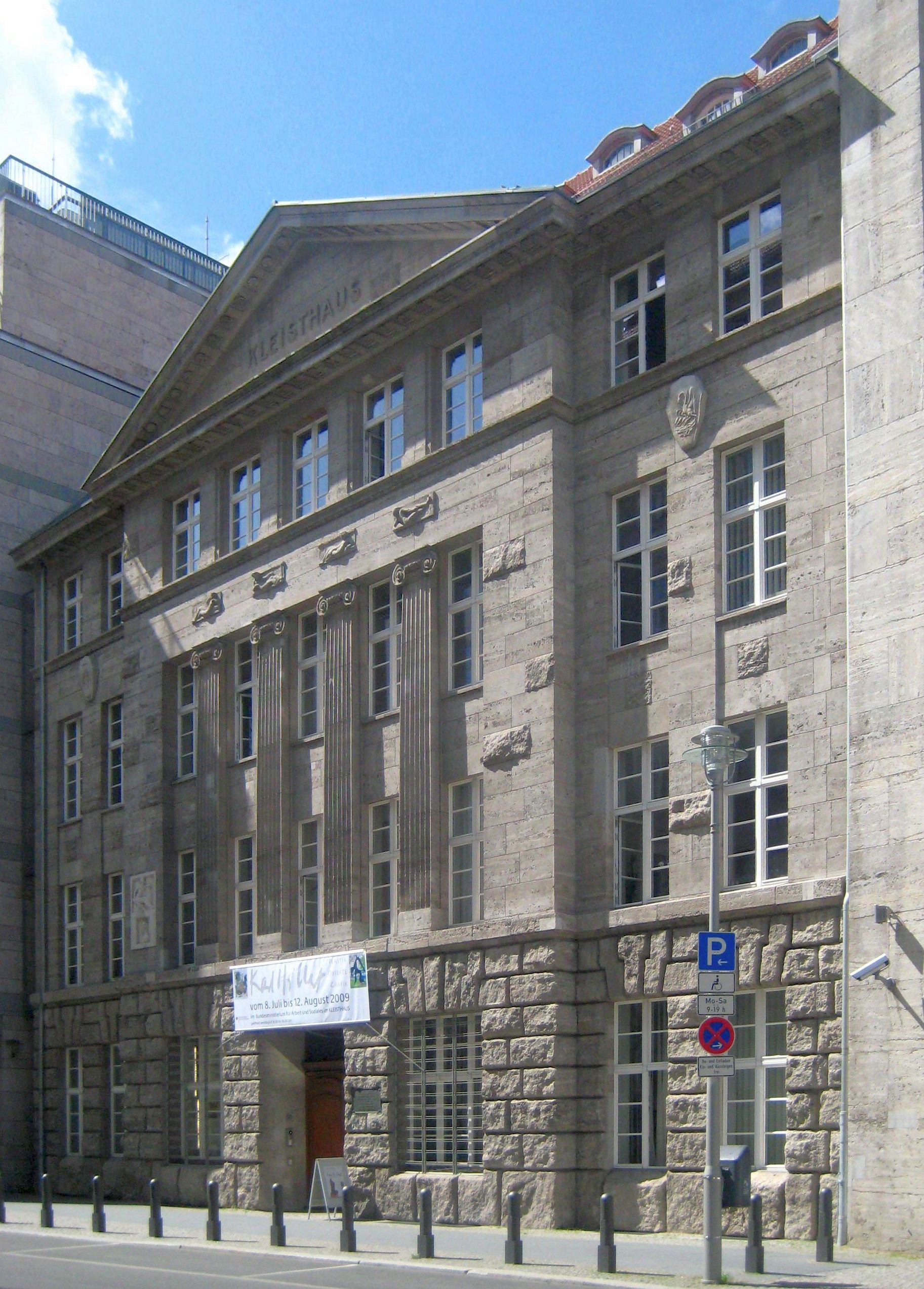 Das Kleisthaus in der Mauerstraße 53 in Berlin-Mitte, heute Komplex des Bundesministerium für Arbeit und Soziales gehörig und Sitz des Pressezentrums. Es wurde 1912-1913 vom Architekten Bodo Ebhardt für das Bankhaus von der Heydt & Co erbaut. Das neoklassizistische Gebäude ist benannt nach dem Dichter Heinrich von Kleist, der in einem Vorgängerbau an diesem Ort gewohnt hatte. Die Fassade wird geprägt von einem giebelgekrönten Mittelrisalit, der durch ionische Kolosaalpilaster gegliedert wird. Das Sockelgeschoss ist rustiziert, die Obergeschosse sind mit Muschelkalkstein verkleidet sowie mit einzelnen rustizierten Steinen aufgelockert. Der Bauschmuck (darunter ein Reliefporträt von Kleist und eine Amazonendarstellung) stammt vom Bildhauer Georg Kolbe, der auch eine an Kleist erinnernde bronzene Relieftafel schuf. Das Gebäude wurde ab 1936 von der Deutschen Landesbankenzentrale genutzt und 1942 in den benachbarten Komplex des Reichsministeriums für Volksaufklärung und Proaganda integriert. In der DDR-Zeit saß hier das DRK. Das Haus wurde 1997-2000 durch den Architekten Josef Paul Kleihues umgebaut. Es ist als Baudenkmal gelistet.